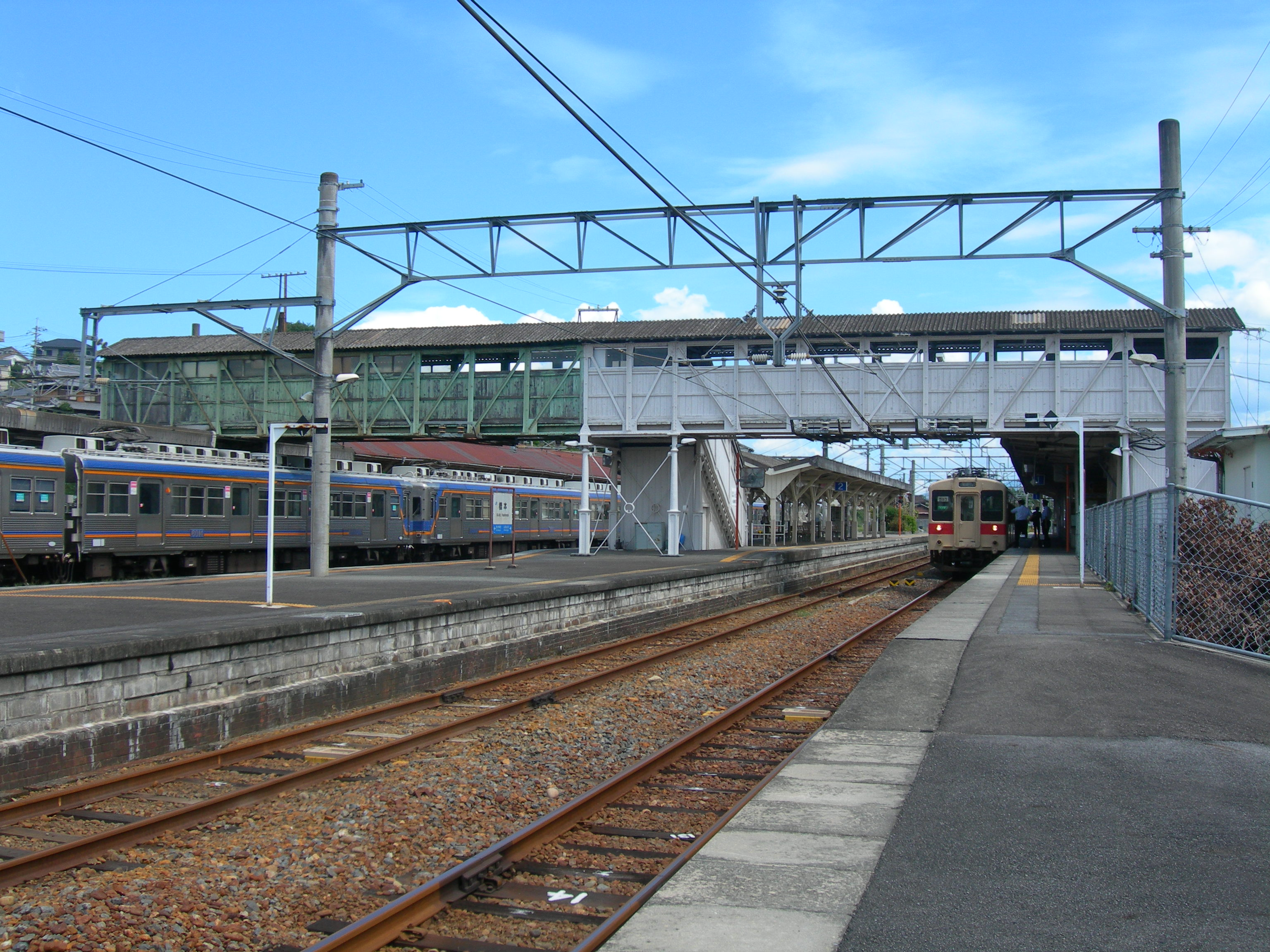 橋本駅 (和歌山県)プラットホーム